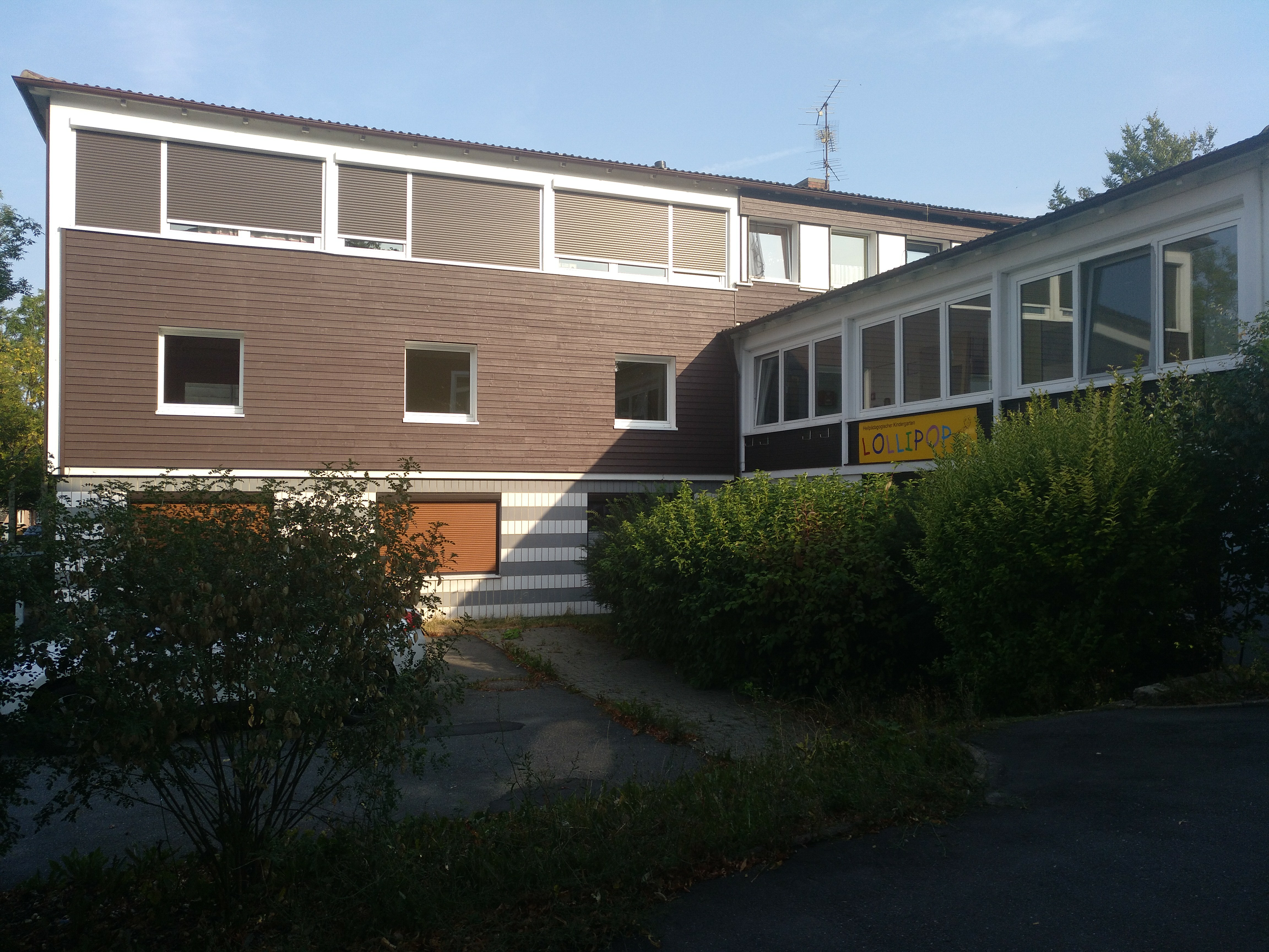 Neuer Sitz der Gemeinde Harlingerode von 1960 bis 1972 an der Landstraße 26, jetzt Platz eines Kindergartens der Lebenshilfe Goslar